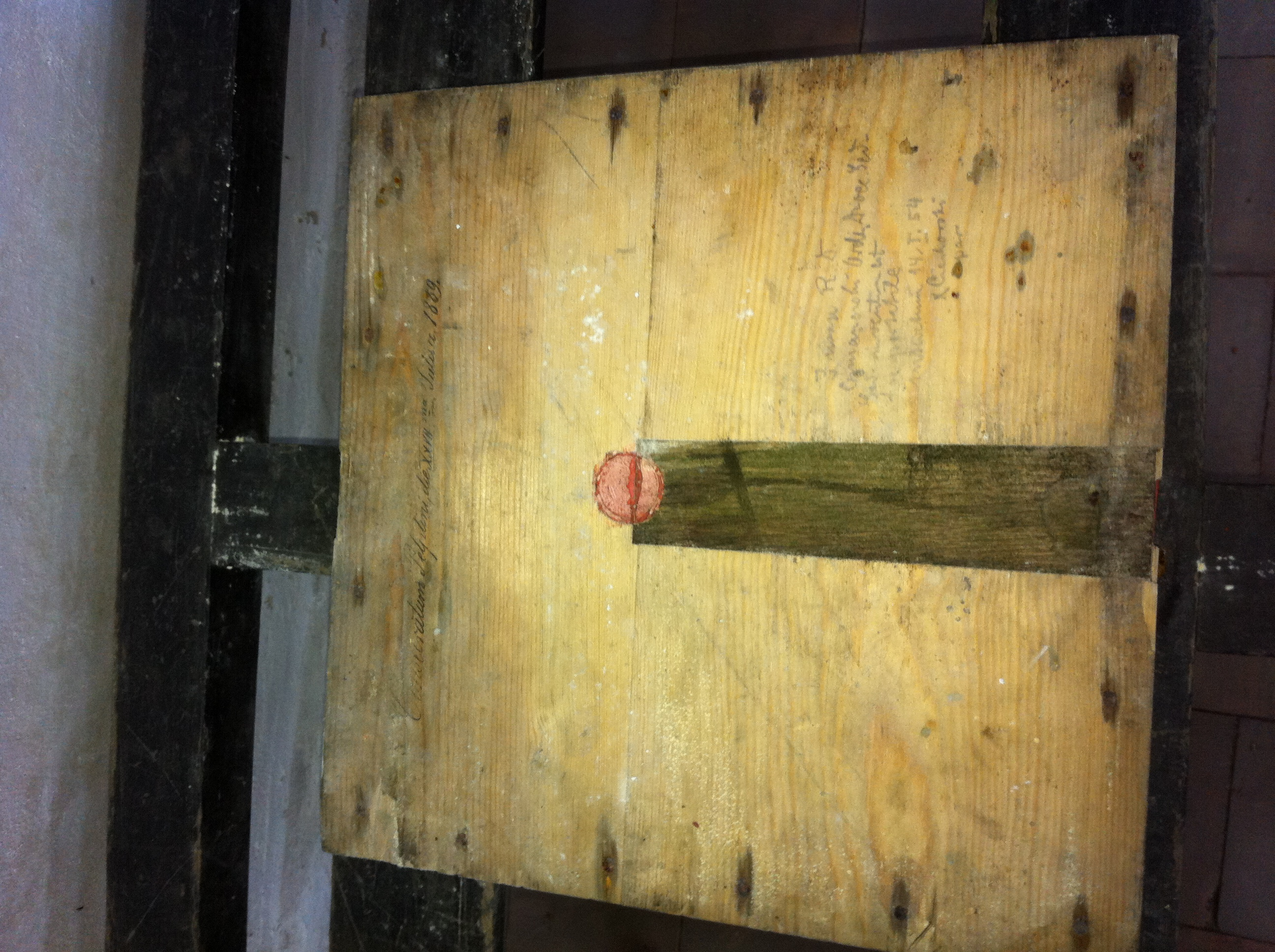 Kamień zawierający relikwie umieszczany kiedyś w ołtarzu kościoła p.w. św. Ignacego Loyola w Gdańsku Starych-Szkotach, obecnie znajduje się w krypcie tego kościoła